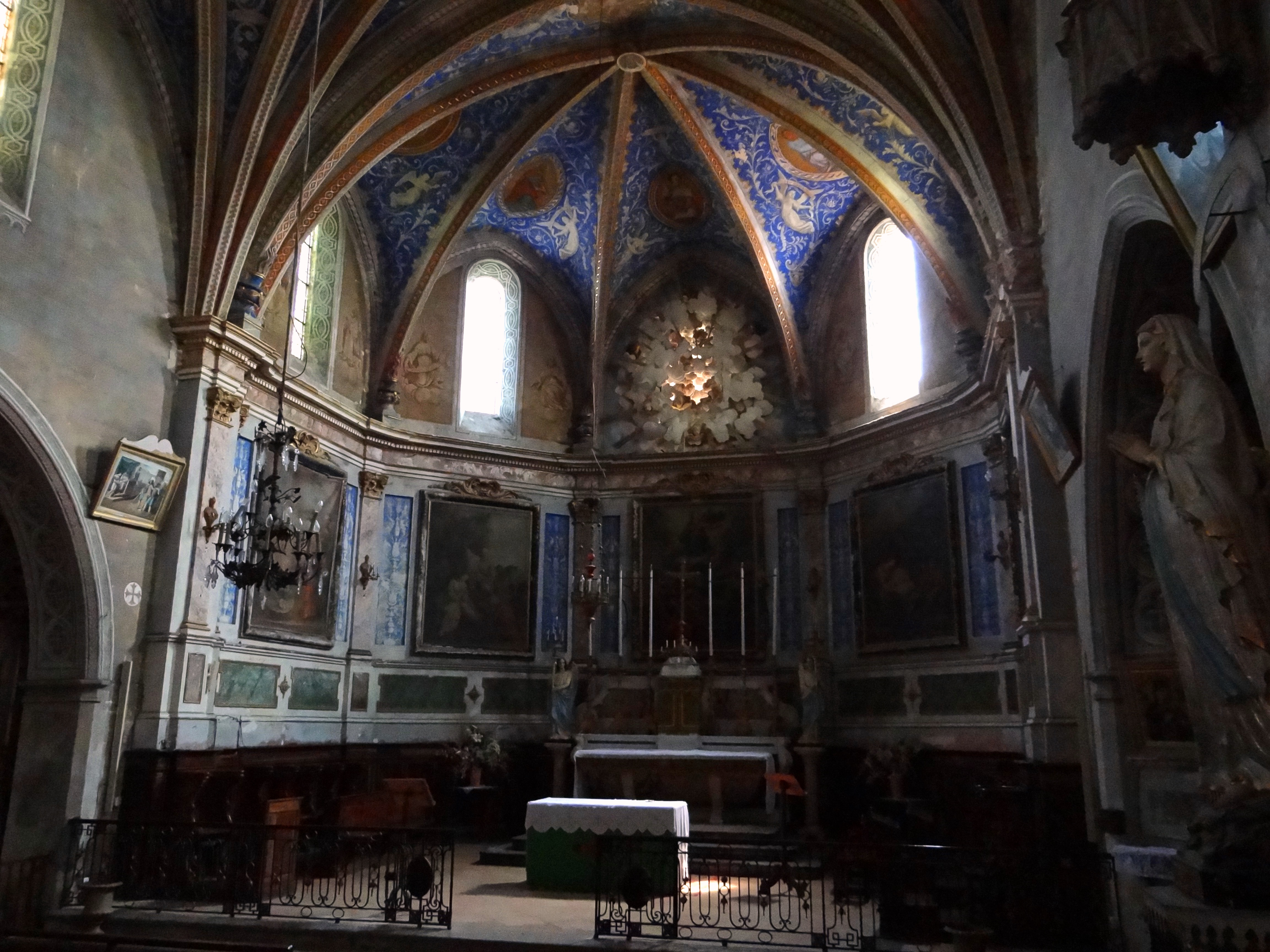 Chœur de l'église